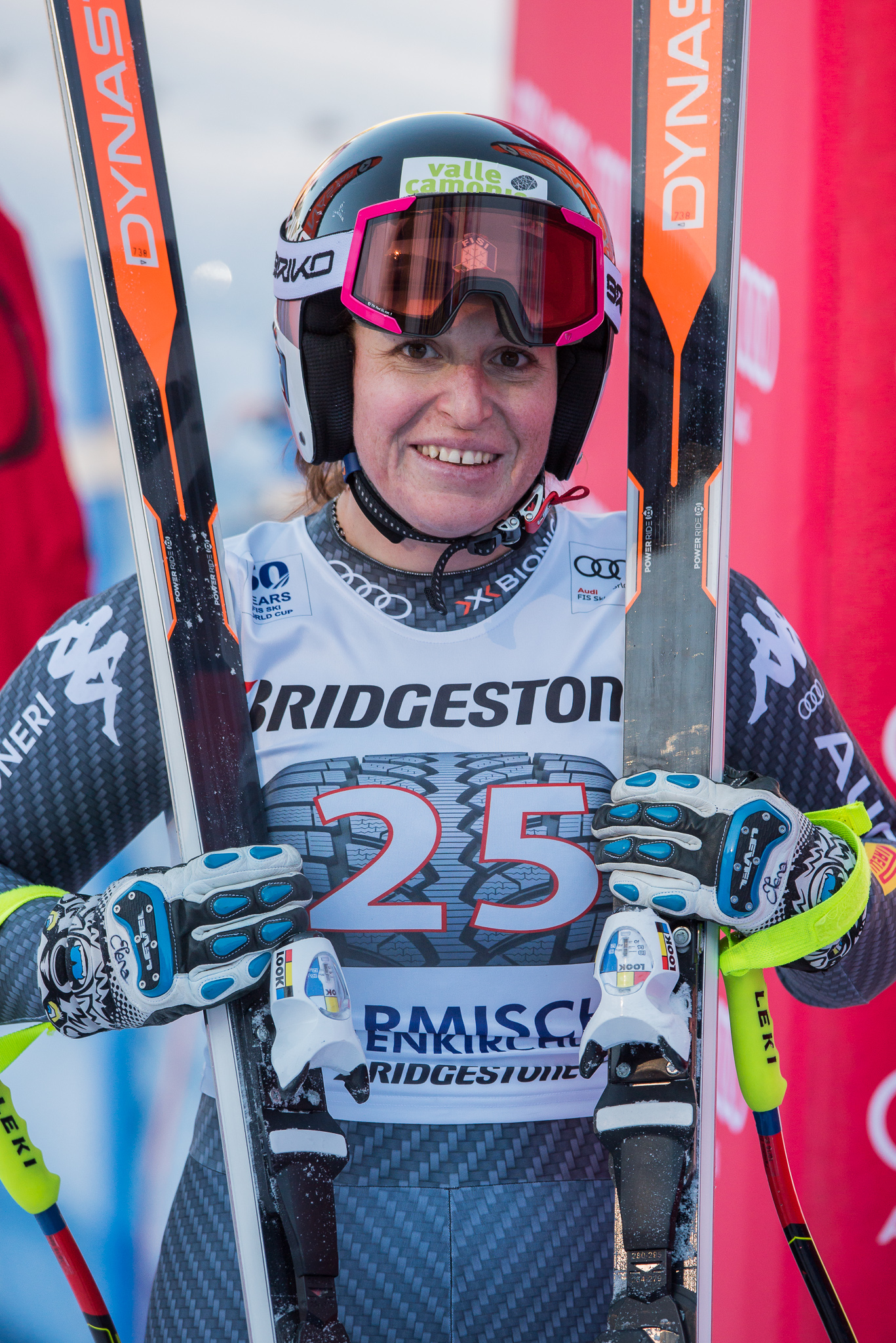 64. Kandahar Rennen,Audi FIS Ski Weltcup Garmisch-Partenkirchen,Damen Super-G,Elena Fanchini,Kandahar,Ladies Super-G